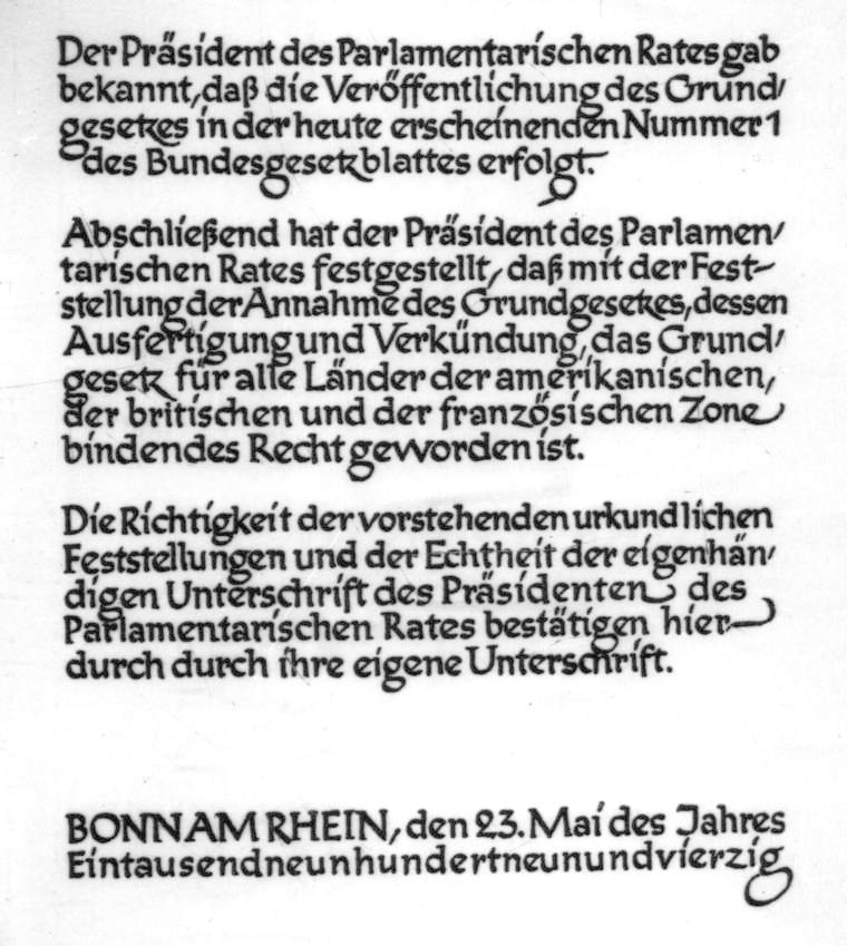 Grundgesetz für die Bundesrepublik Deutschland 1949, Faksimile der Verkündungsformel Basic Law for The Federal Republic of Germany 1949, facsimile of the official rendition. Transcription of text is following: Der Präsident des Parlamentarischen Rates gab bekannt, daß die Veröffentlichung des Grundgesetzes in der heute erscheinenden Nummer 1 des Bundesgesetzblattes erfolgt. Abschließend hat der Präsident des Parlamentarischen Rates festgestellt, daß mit der Feststellung der Annahme des Grundgesetzes, dessen Ausfertigung und Verkündung, das Grundgesetz für alle Länder der amerikanischen, der britischen und der französischen Zone bindendes Recht geworden ist. Die Richtigkeit der vorstehenden urkundlichen Feststellungen und er Echtheit der eigenhändigen Unterschrift des Präsidenten des Parlamentarischen Rates bestätigen hier durch durch ihre eigene Unterschrift. BONN AM RHEIN, den 23. Mai des Jahres Eintausendneunhundertneunundvierzig (§ 5 Absatz 1 UrhG)